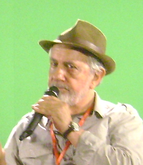 Paulo José, ator e diretor brasileiro, durante a 35ª Mostra Internacional de Cinema de São Paulo.